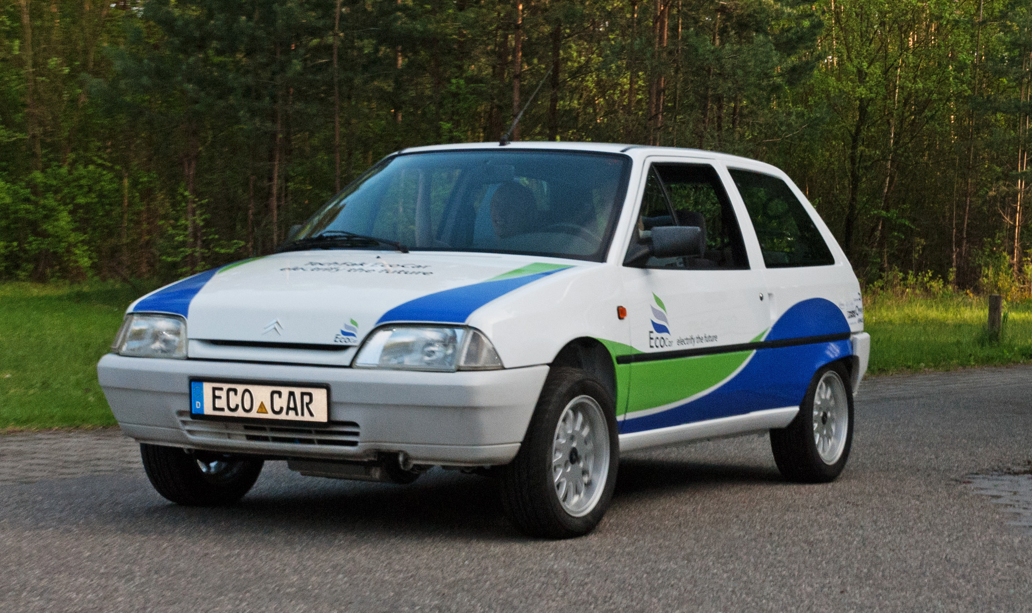 Das EcoCar, der umgebaute Citroen AX